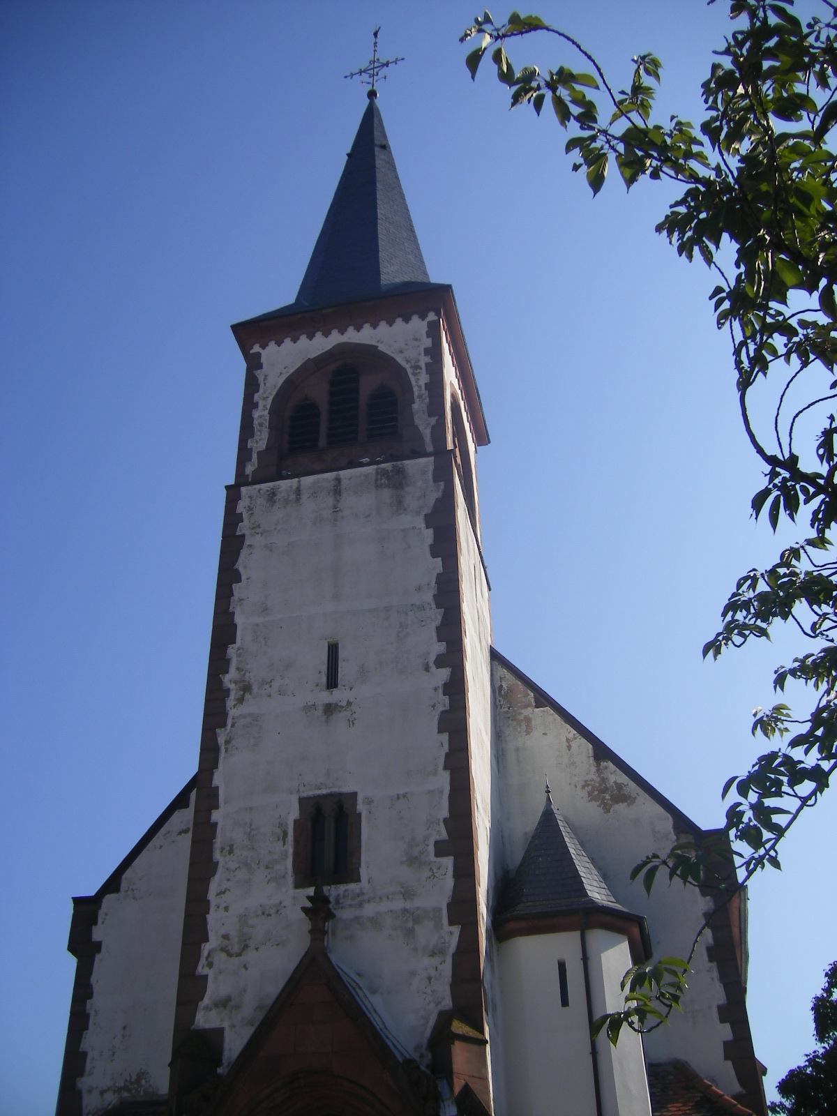 Gries, Eglise catholique Saint-Jacques le Majeur (1910)